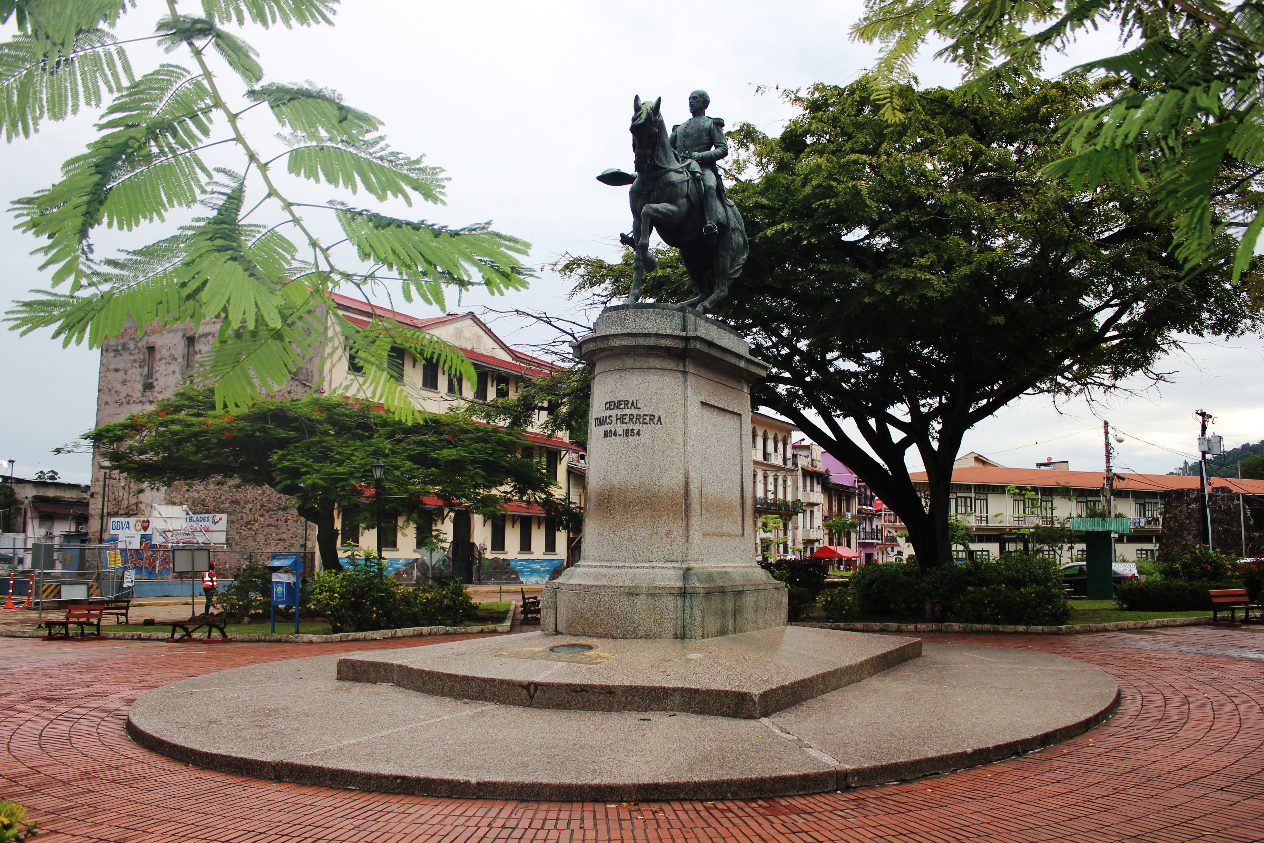 Plaza Herrera en el Casco Antiguo, Ciudad de Panamá. Sitio declarado Patrimonio de la Humanidad por la UNESCO.